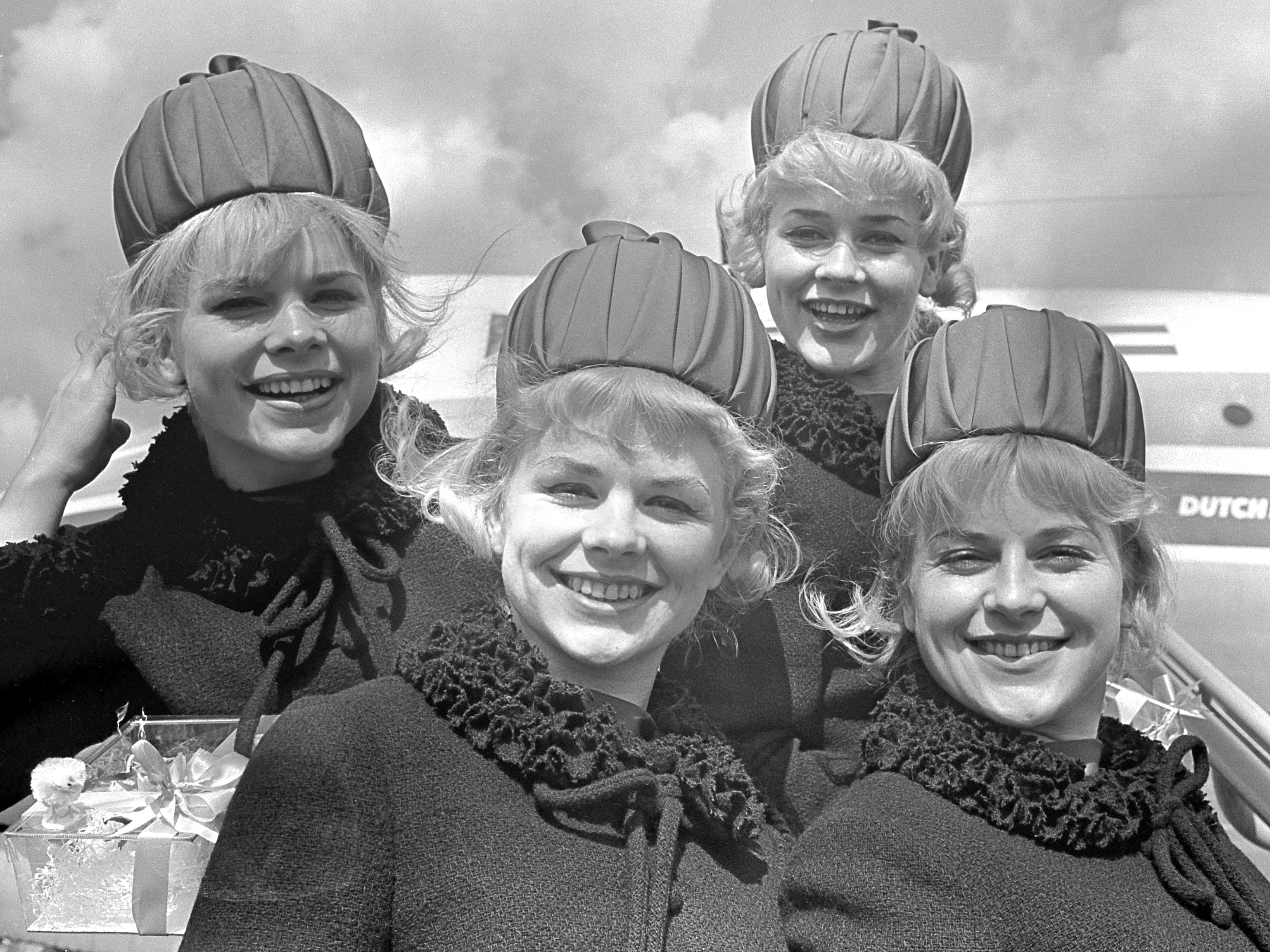 Aankomst Geschwister Jacob op Schiphol, Geschwister Jacob (vier Duitse zusjes) 18 april 1965